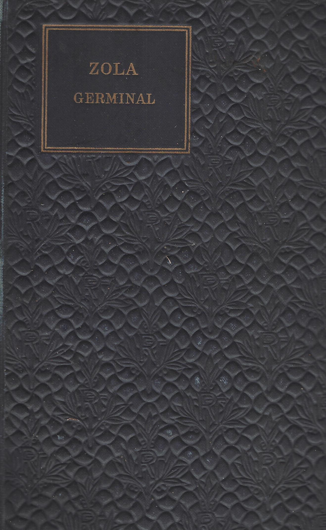 Emile Zola: Germinal (Klasszikus Regénytár sorozat, 1907)